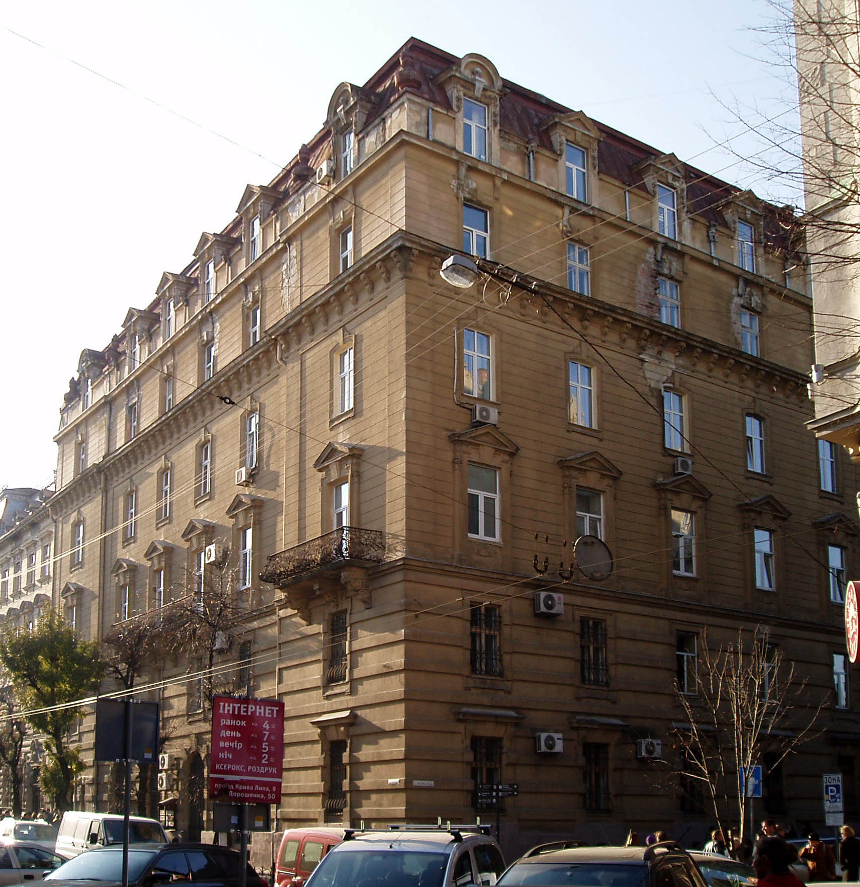 Дім № 14 на вулиці Січових Стрільців у Львові. Архітектор Юліуш Гохберґер (1840—1905).